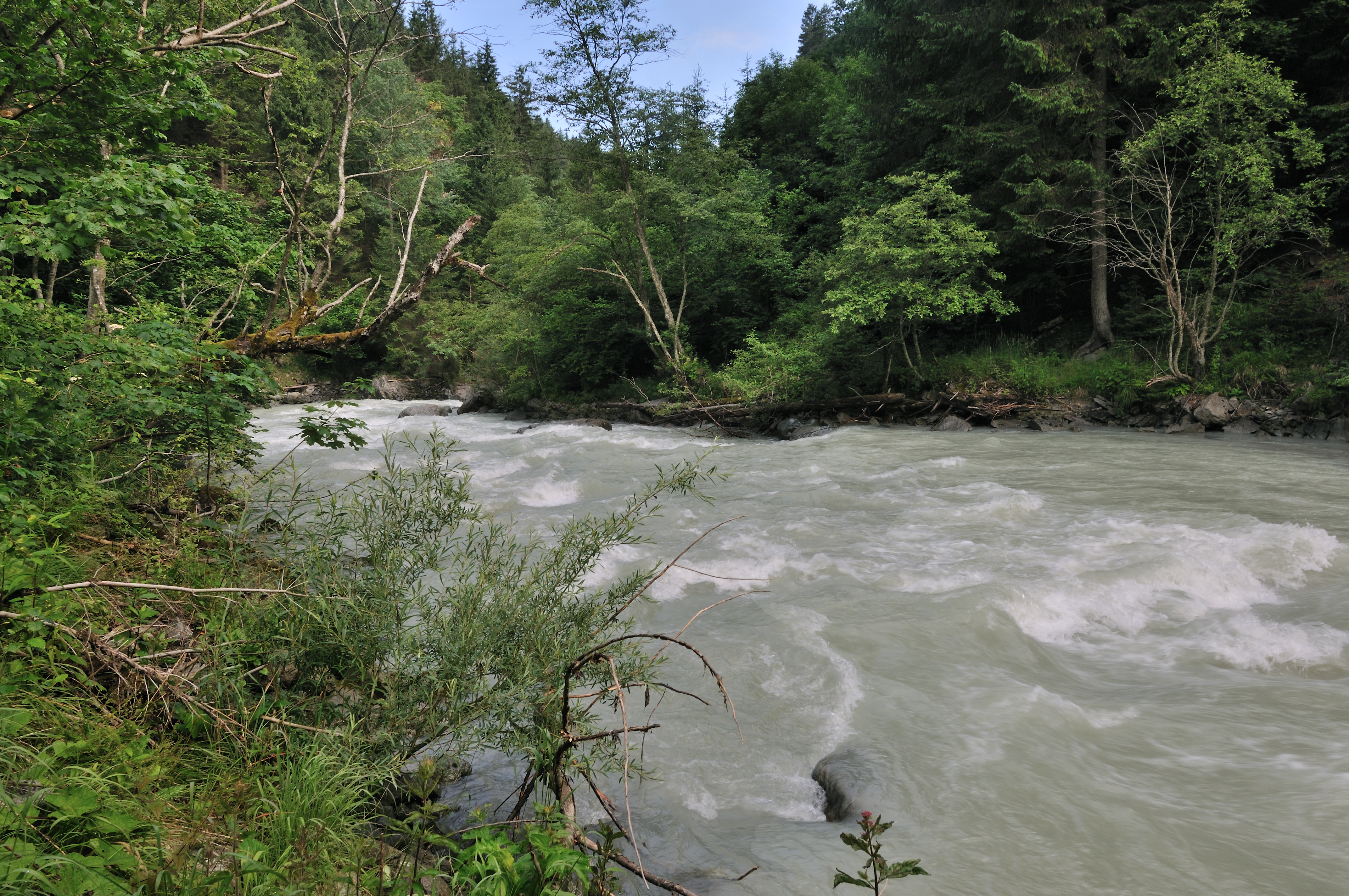 Der Fluss Ruetz nördlich von Schönberg (Stubaital) im Frühsommer